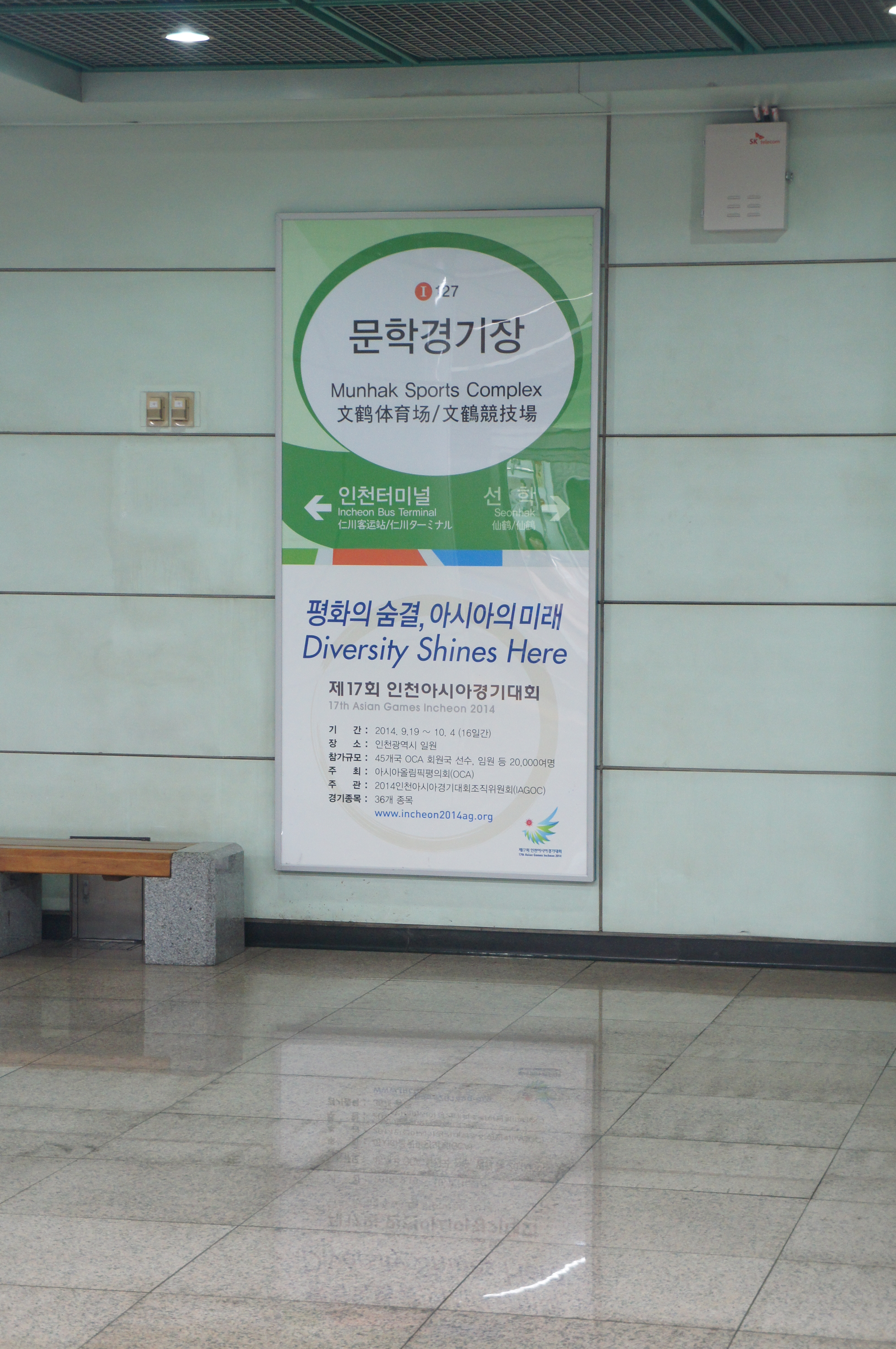 문학경기장역 역명판